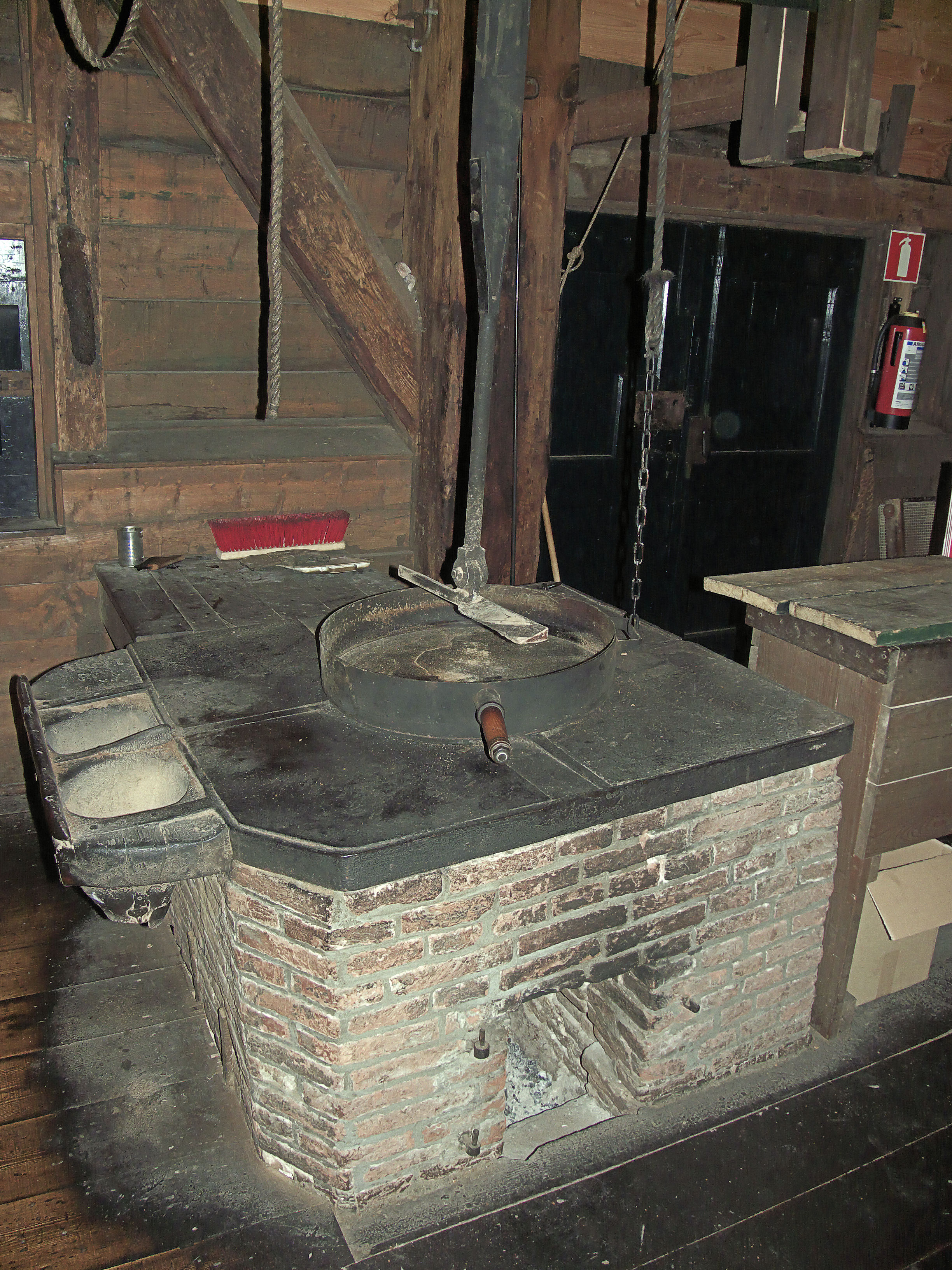 Molen De Passiebloem vuister naslag